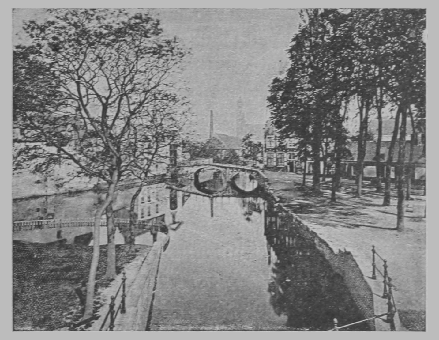 Bruges-la-Morte (Zicht aan het Wijngaardplein en Begijnhofbrug)